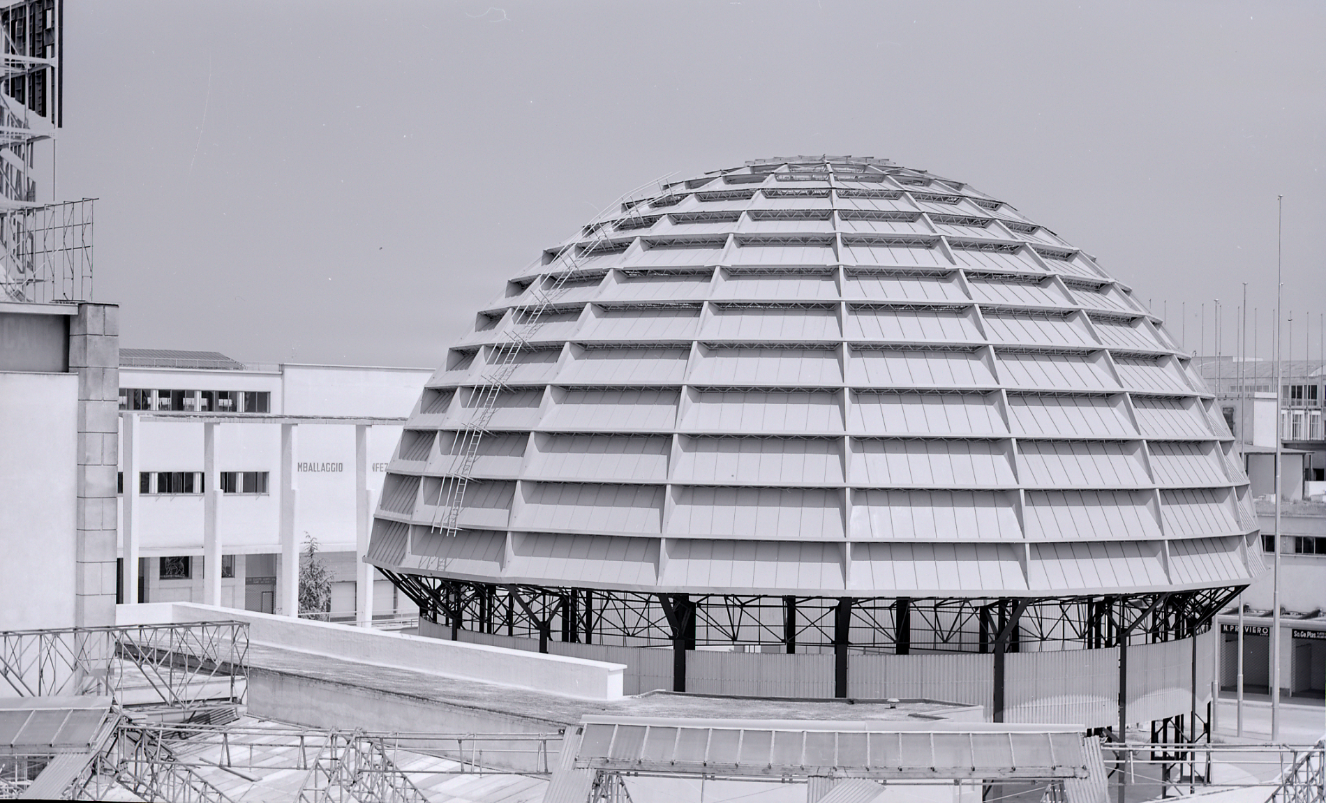 Servizio fotografico : Milano, 1959 / Paolo Monti. - Buste: 11, Fototipi: 13 : Negativo b/n, gelatina bromuro d'argento/ pellicola ; 6x6, 6x9. - ((Serie costituita da 13 negativi identificati con i nn.: 23819-23831. Sulla busta R23819 manoscritto: "Fiera/ Cupola Fiat". Numerazione parallela: R97/101, 107. La suddetta serie è contenuta nella scatola identificata con la numerazione R23809-24178. Sul coperchio manoscritto a pennarello: "Architetti/ Musei e varie". - Occasione: Documentazione del padiglione della società Fiat presso la Fiera di Milano del 1959